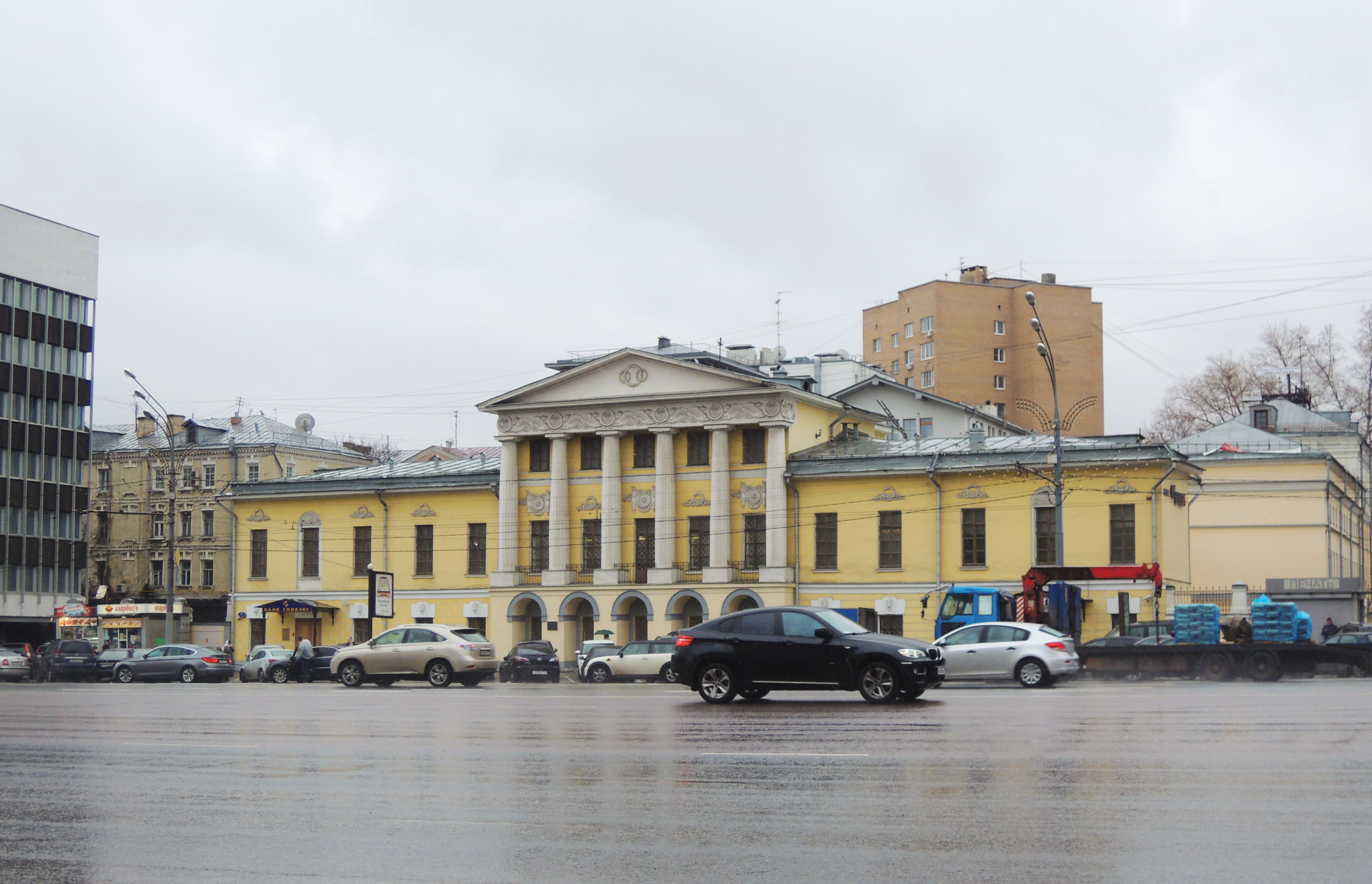 Zubovsky Boulevard